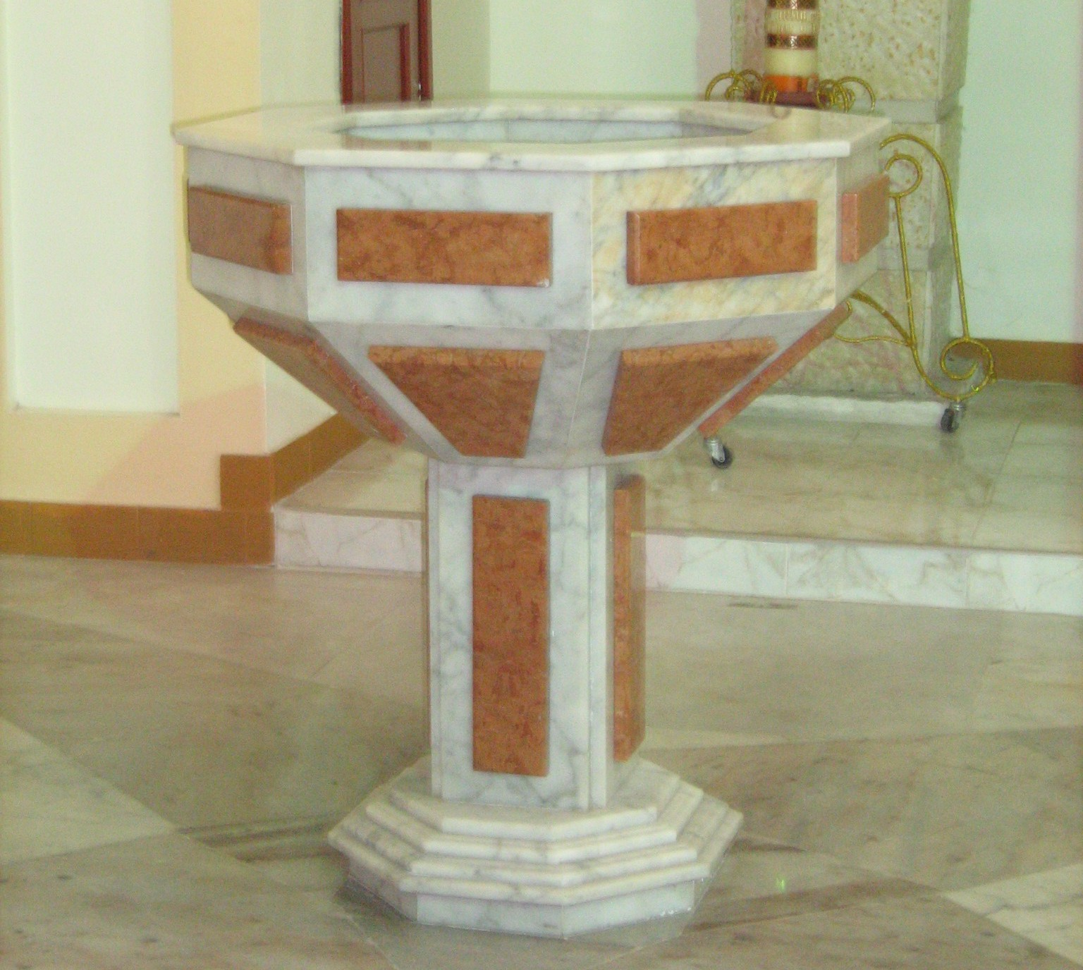 Pila Bautismal de la Basílica de Yarumal, Antioquia, Colombia.